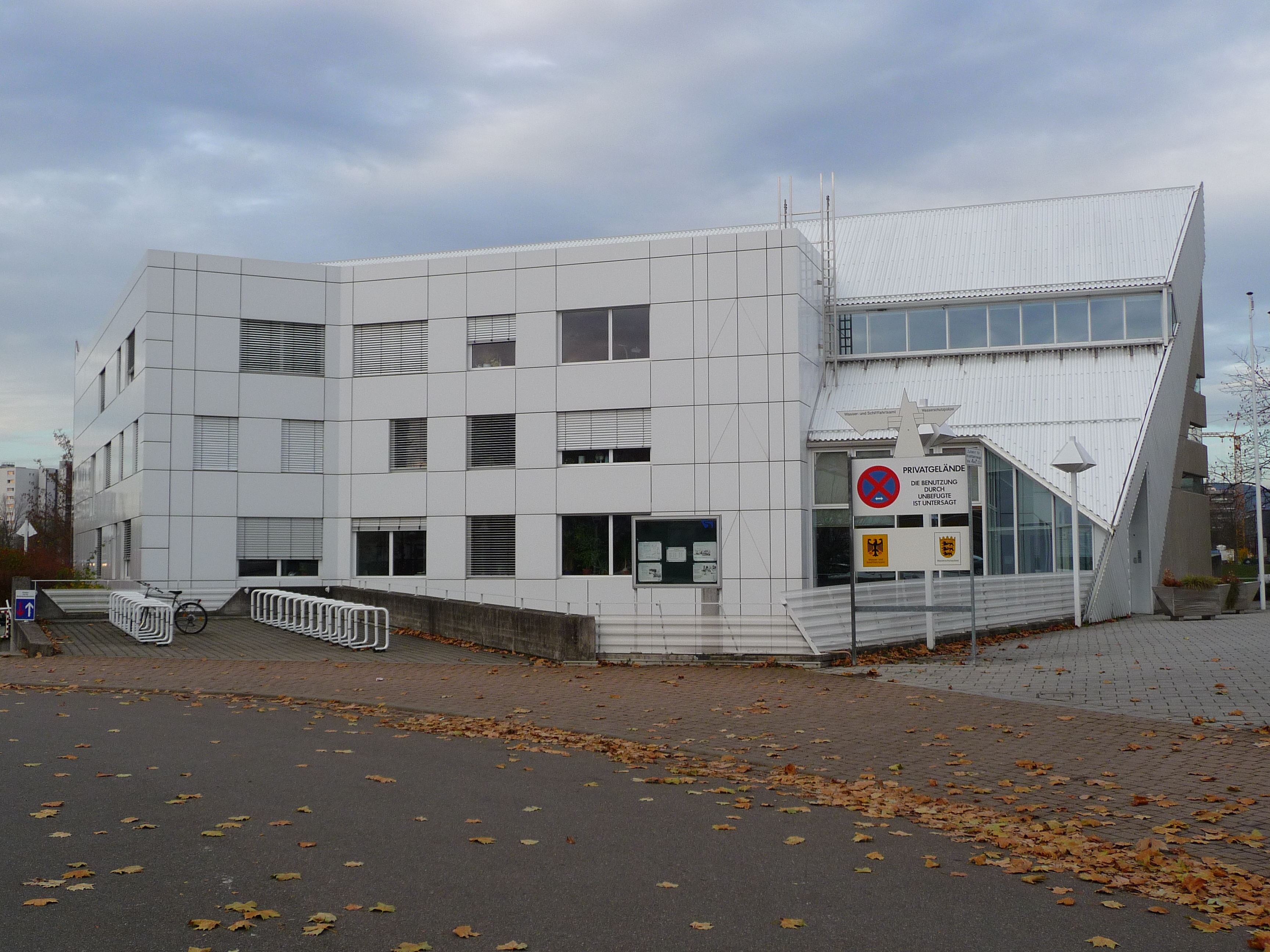 Wasser- und Schifffahrtsamt Heidelberg (Baden-Württemberg, Deutschland)